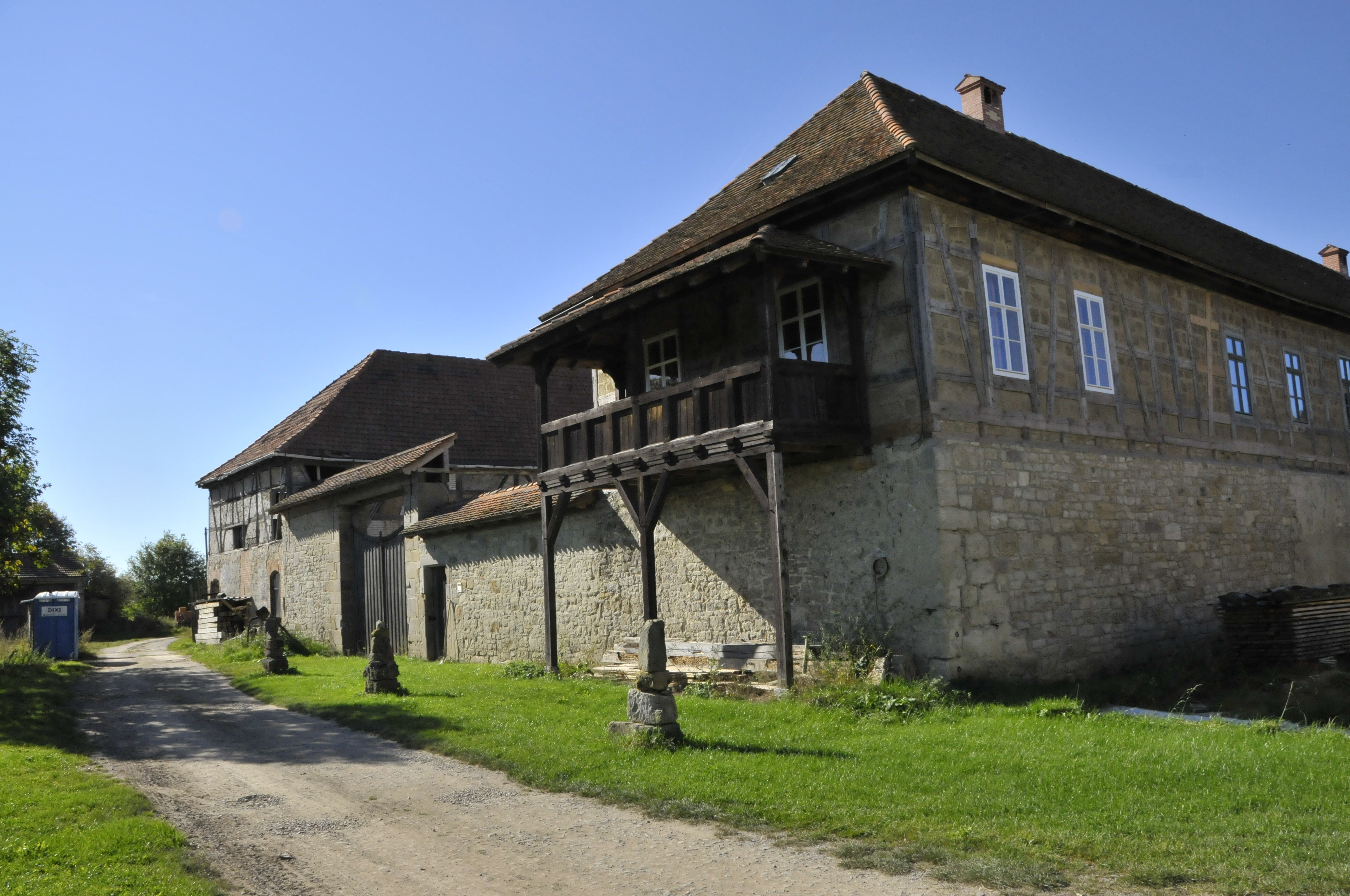 Kottenhain